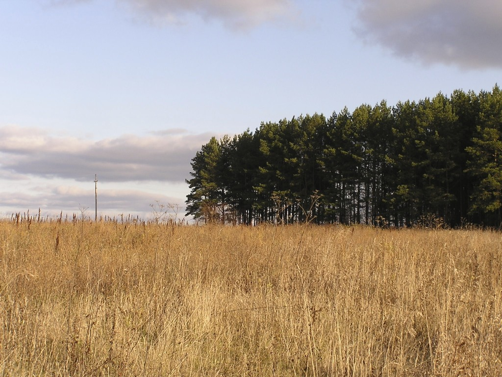 Кривоозерки - Заказник